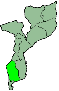 Gaza (Mozambique)